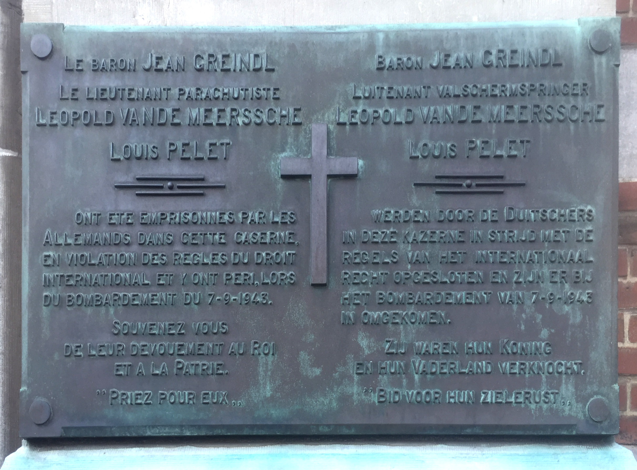 Plaque en hommage à Jean Greindl, Léopold Vande Meerssche et Louis Pelet, avenue de la Couronne n° 227, sur la façade de la caserne de gendarmerie [1], Ixelles, à Bruxelles.